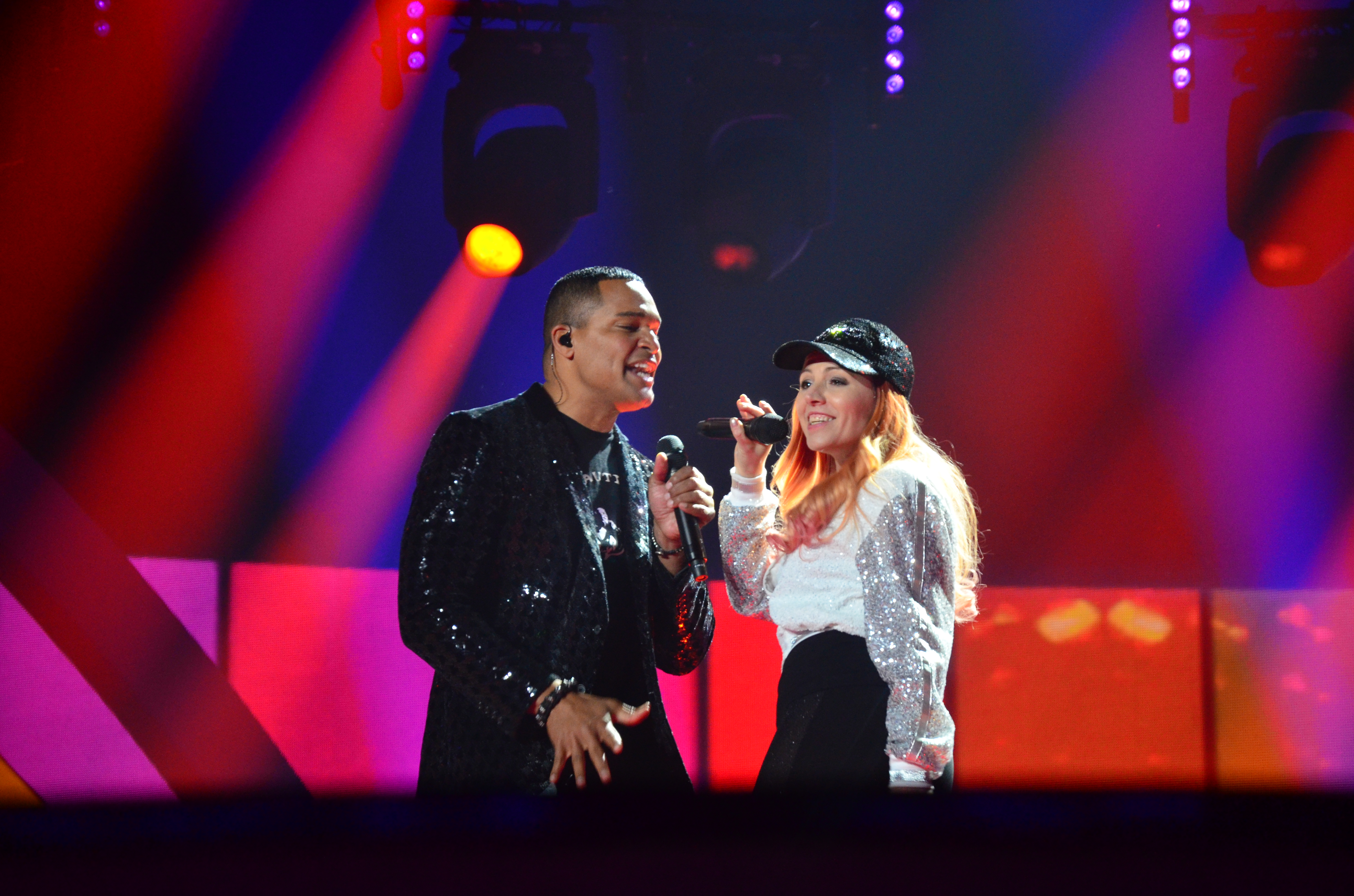 10 травня 2017 року у Києві відбулась генеральна репетиція 2 півфіналу "Євробачення".